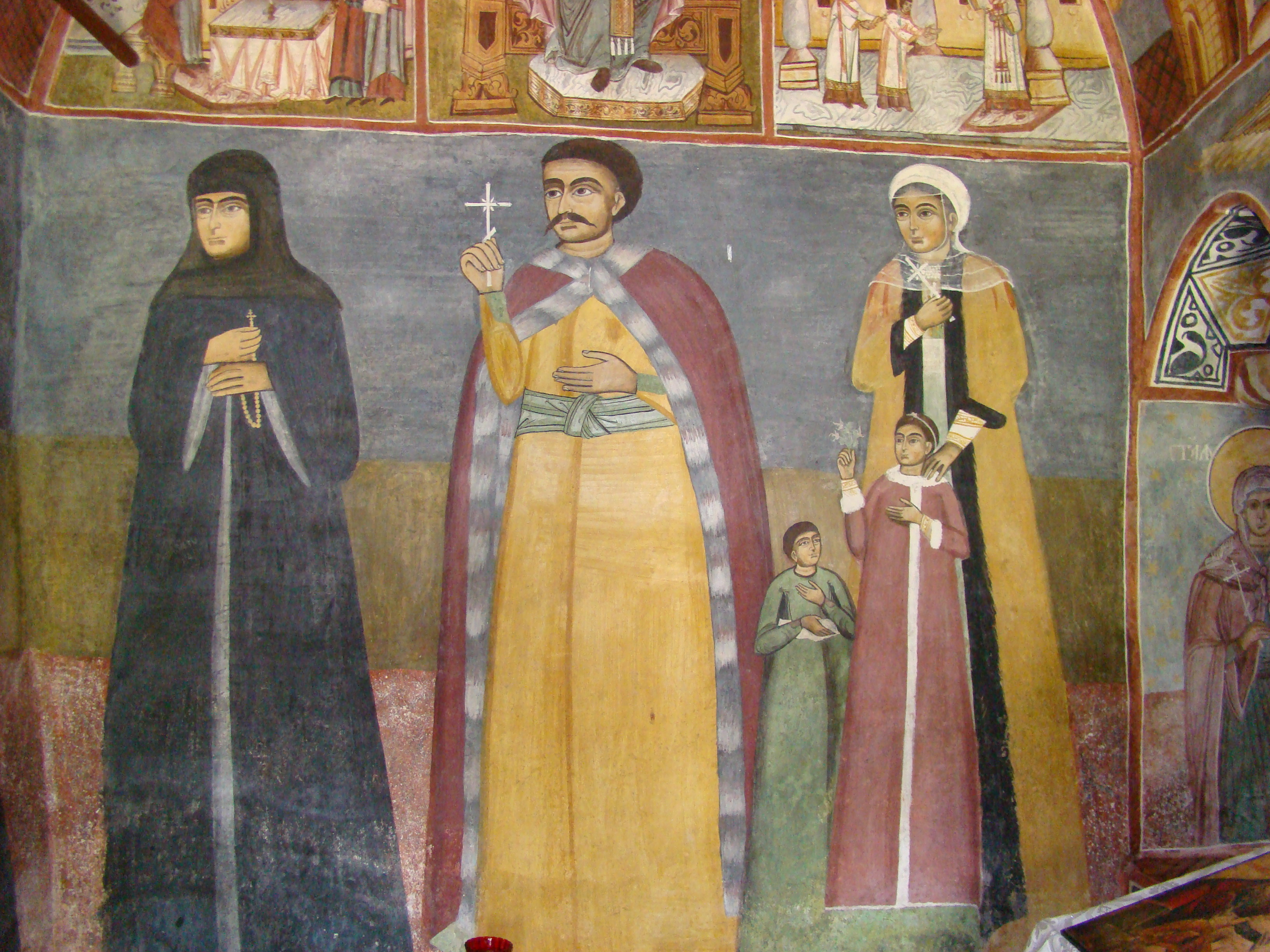 Bolnița Sf.Nicolae, Mănăstirea Polovragi, județul Gorj